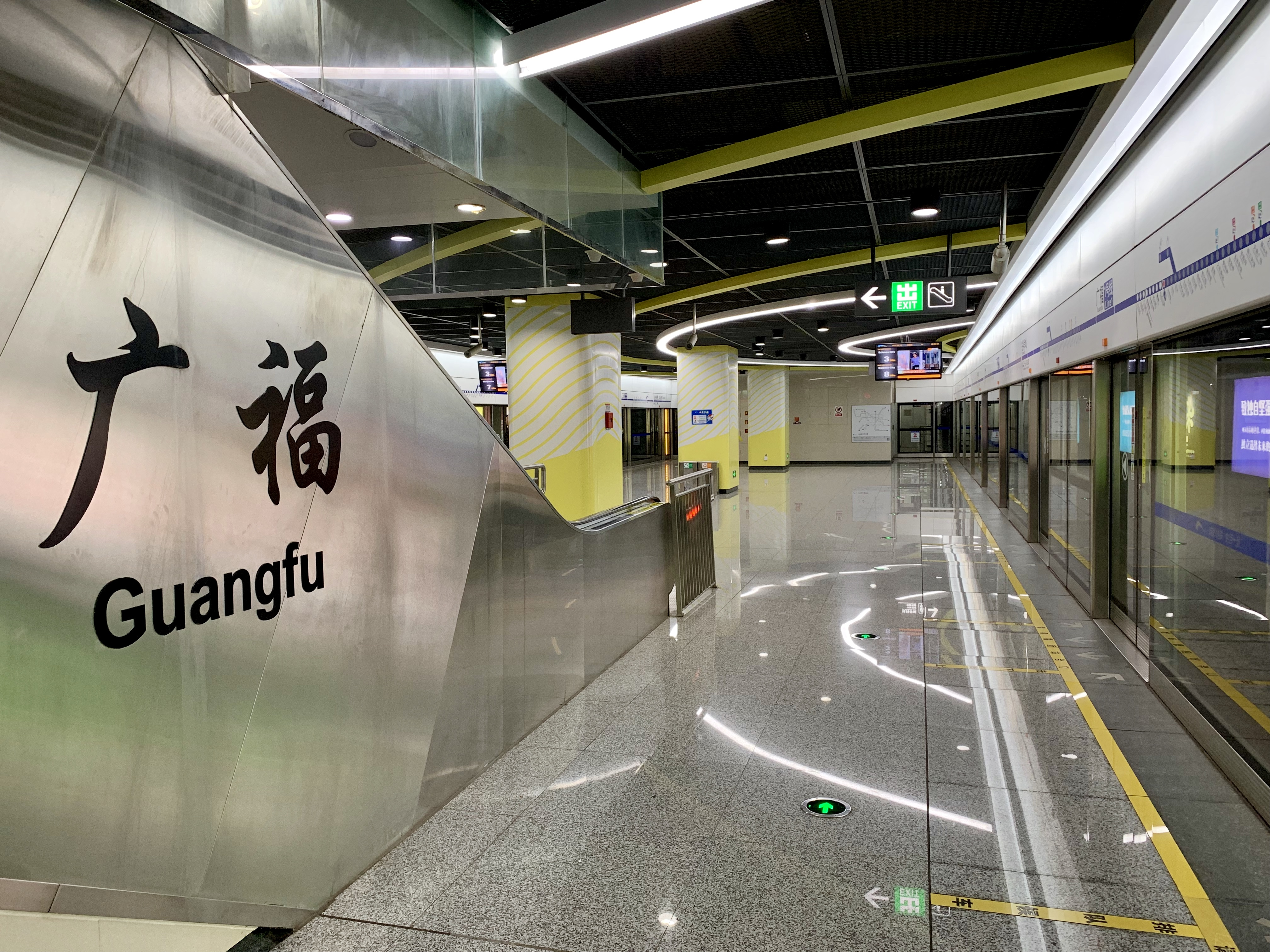 成都地铁广福站